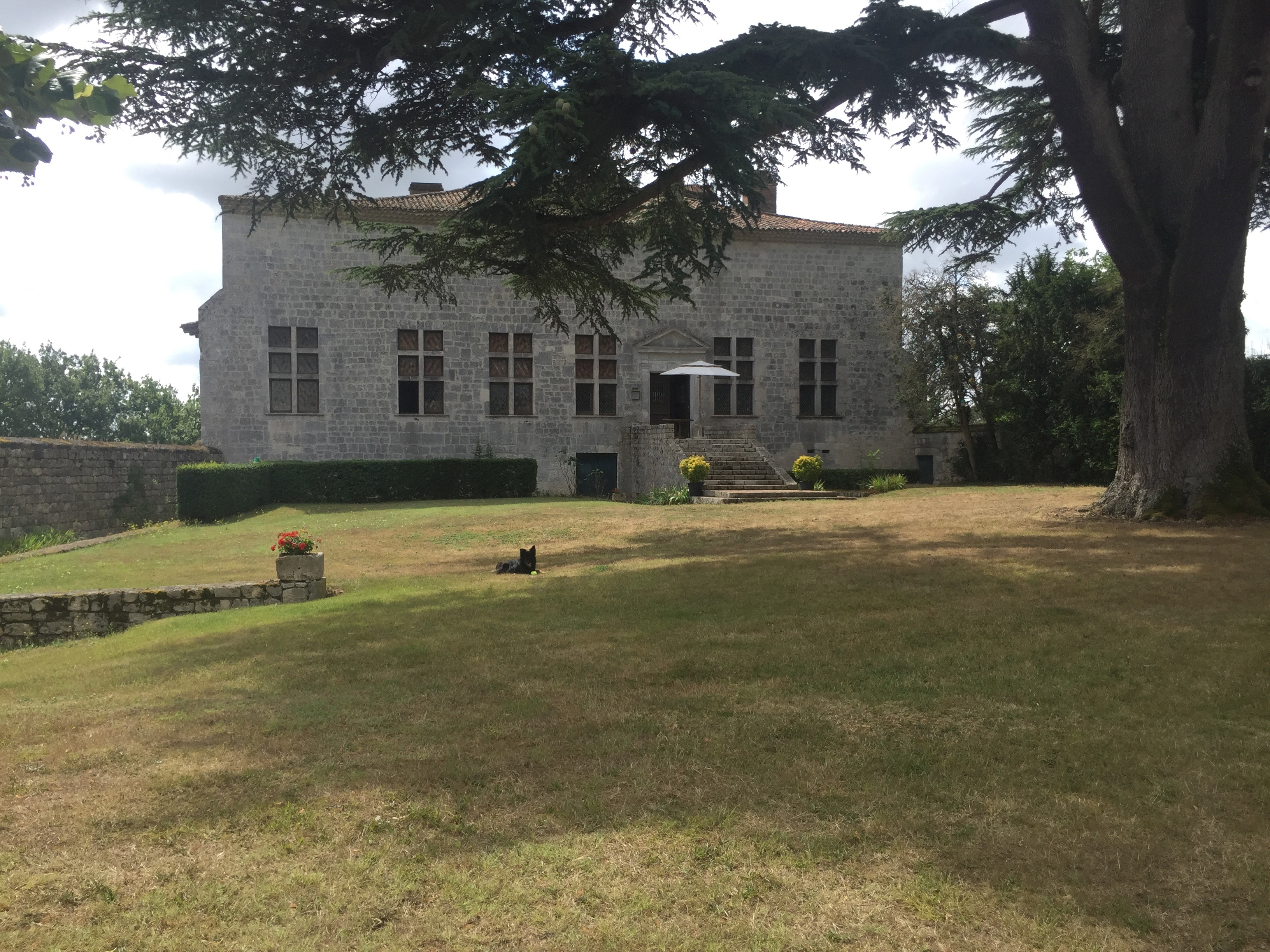 Façade nord actuelle